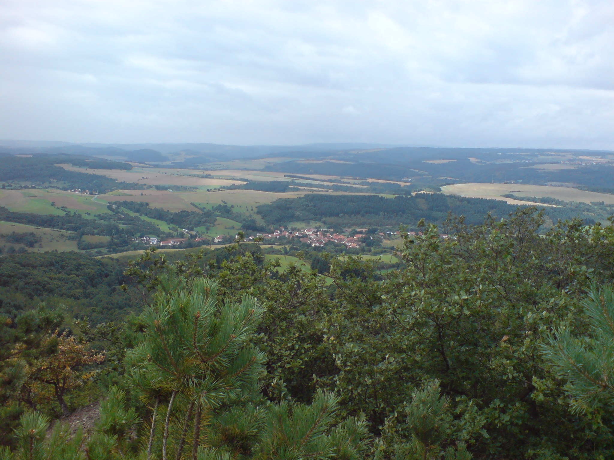 Blick vom Leienberg auf Hinzweiler.